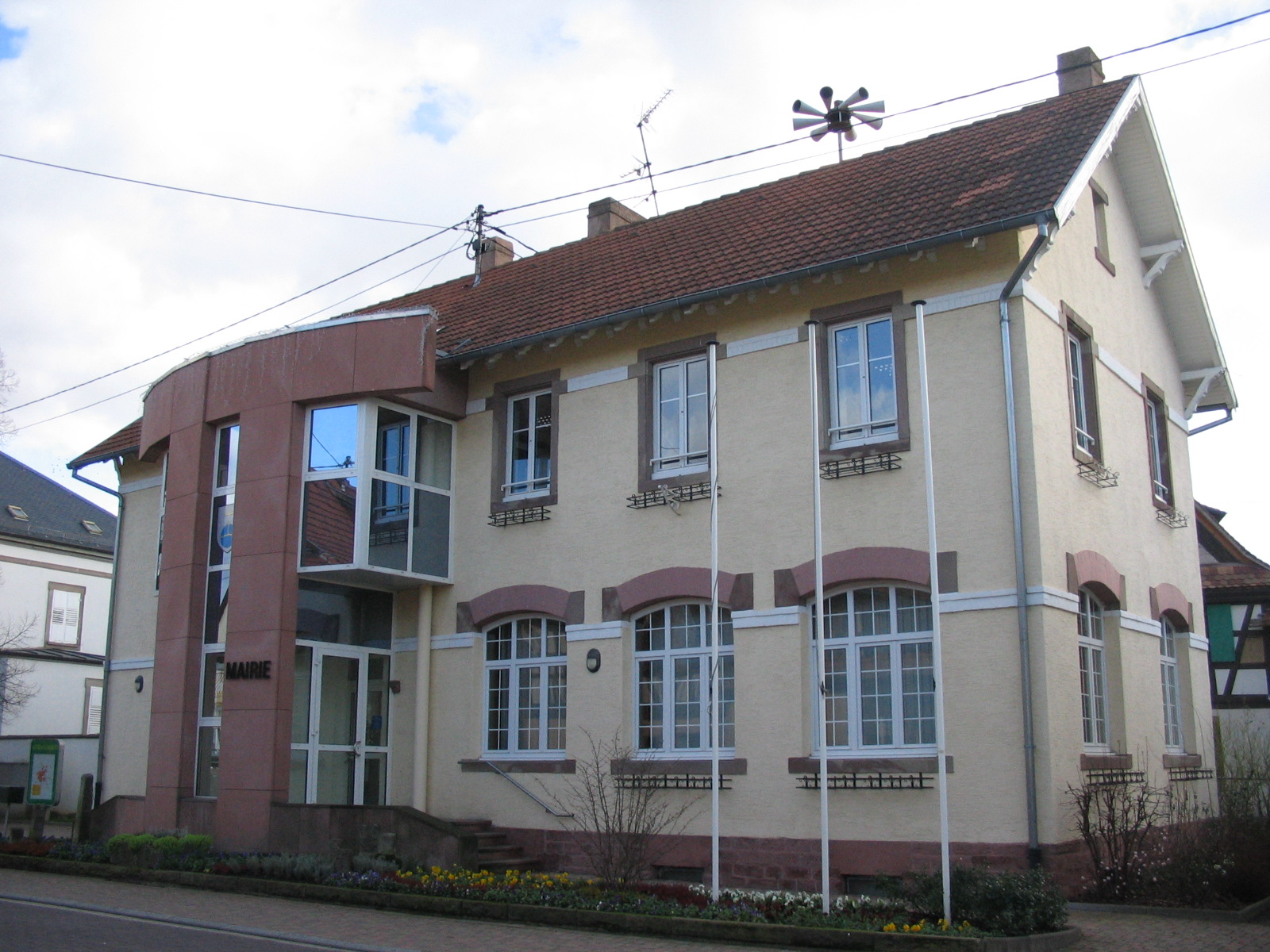 Mairie de Mittelhausbergen (Bas-Rhin)